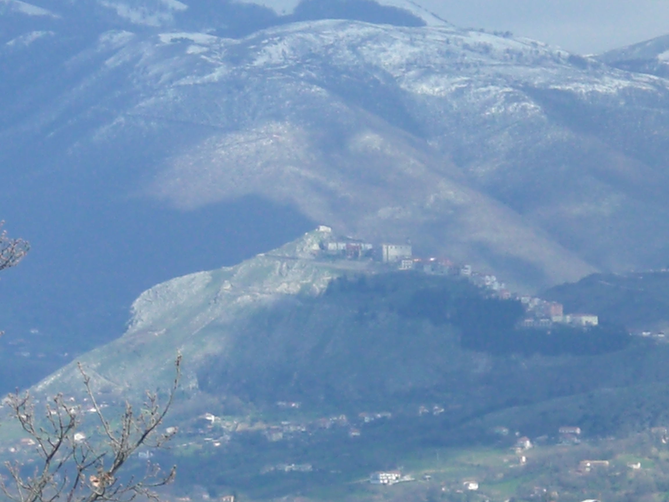 Panorama of Palomonte